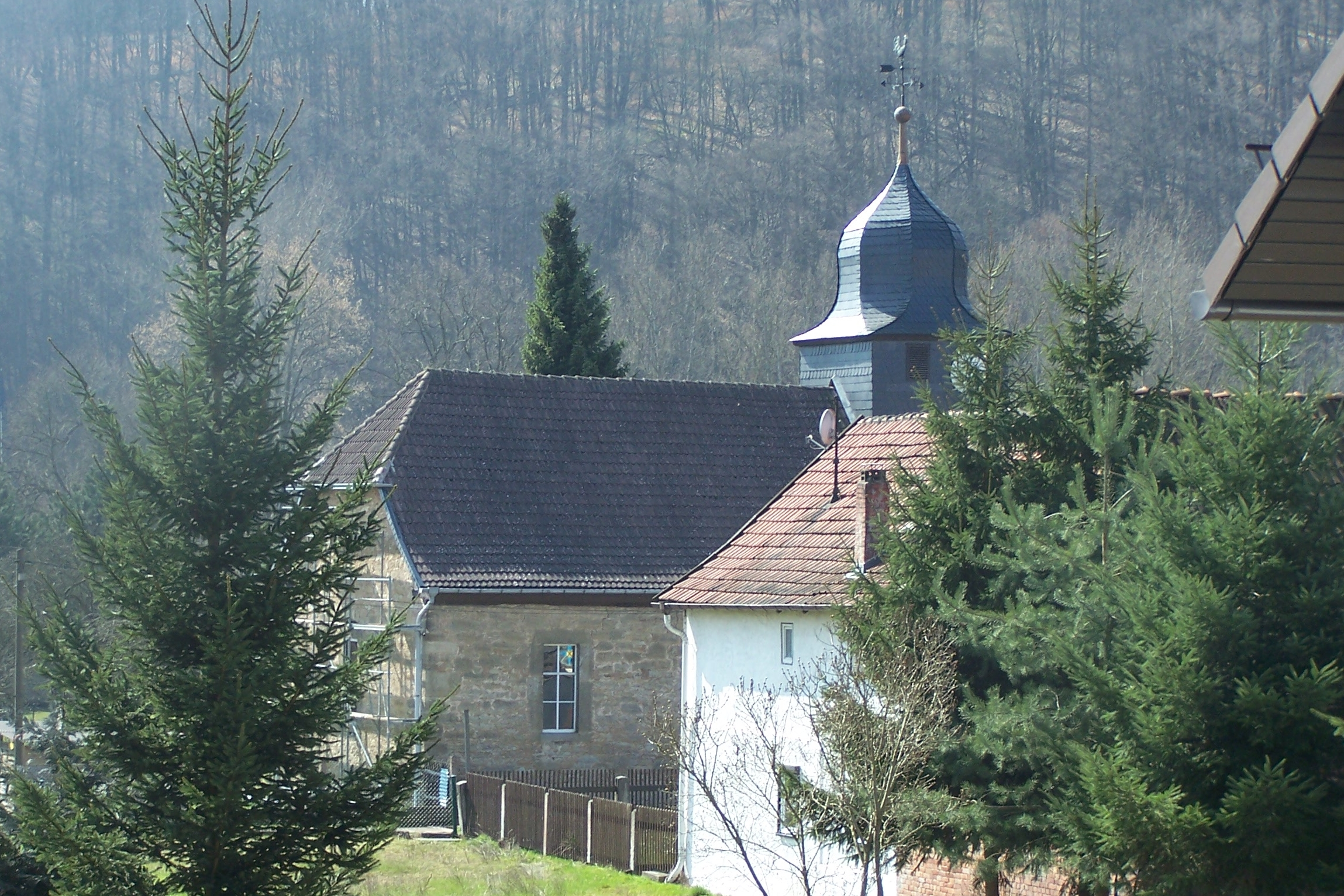 Ebenshausen